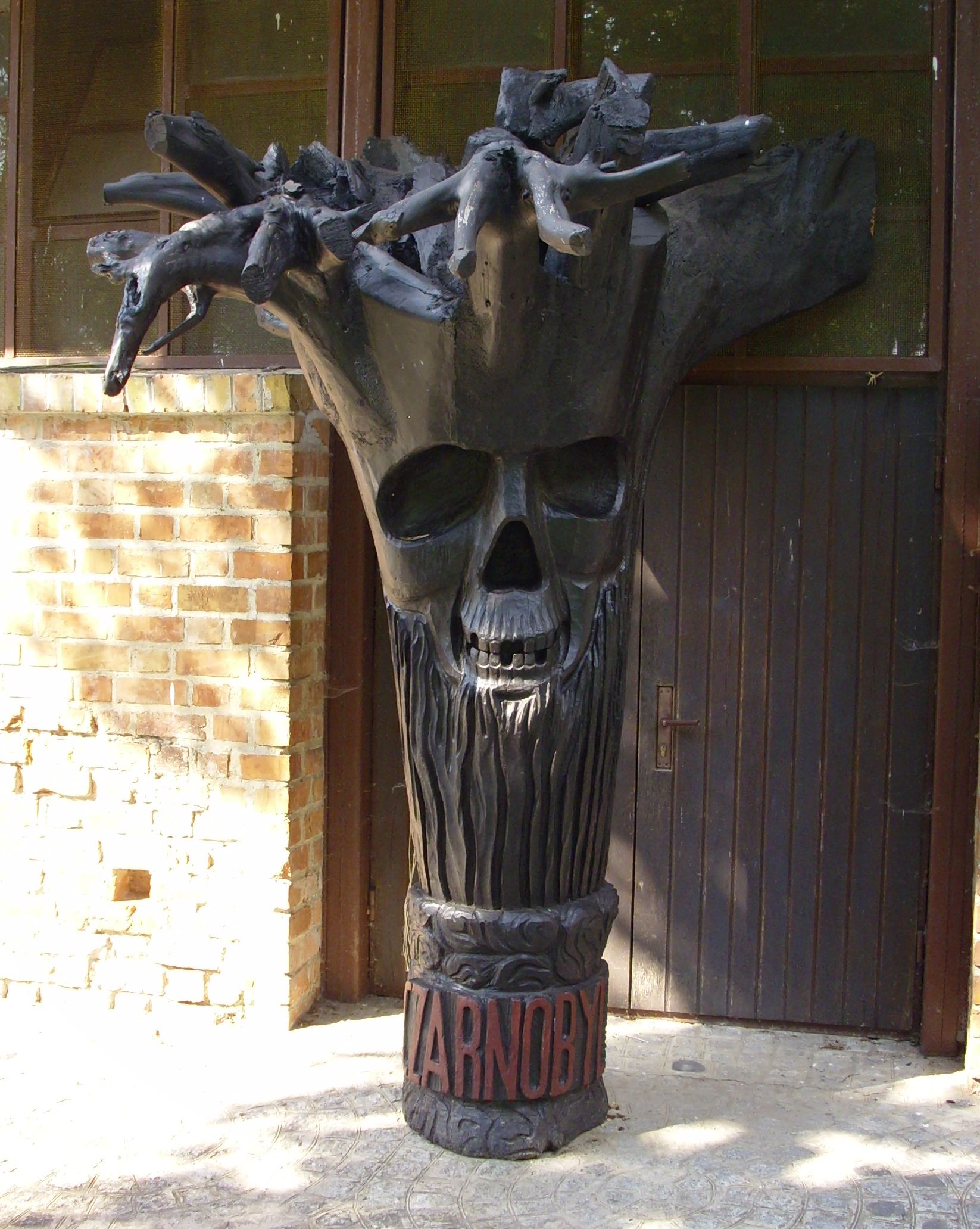 „Czarnobyl” – rzeźba Tadeusza Niewiadomskiego (Kodeń).